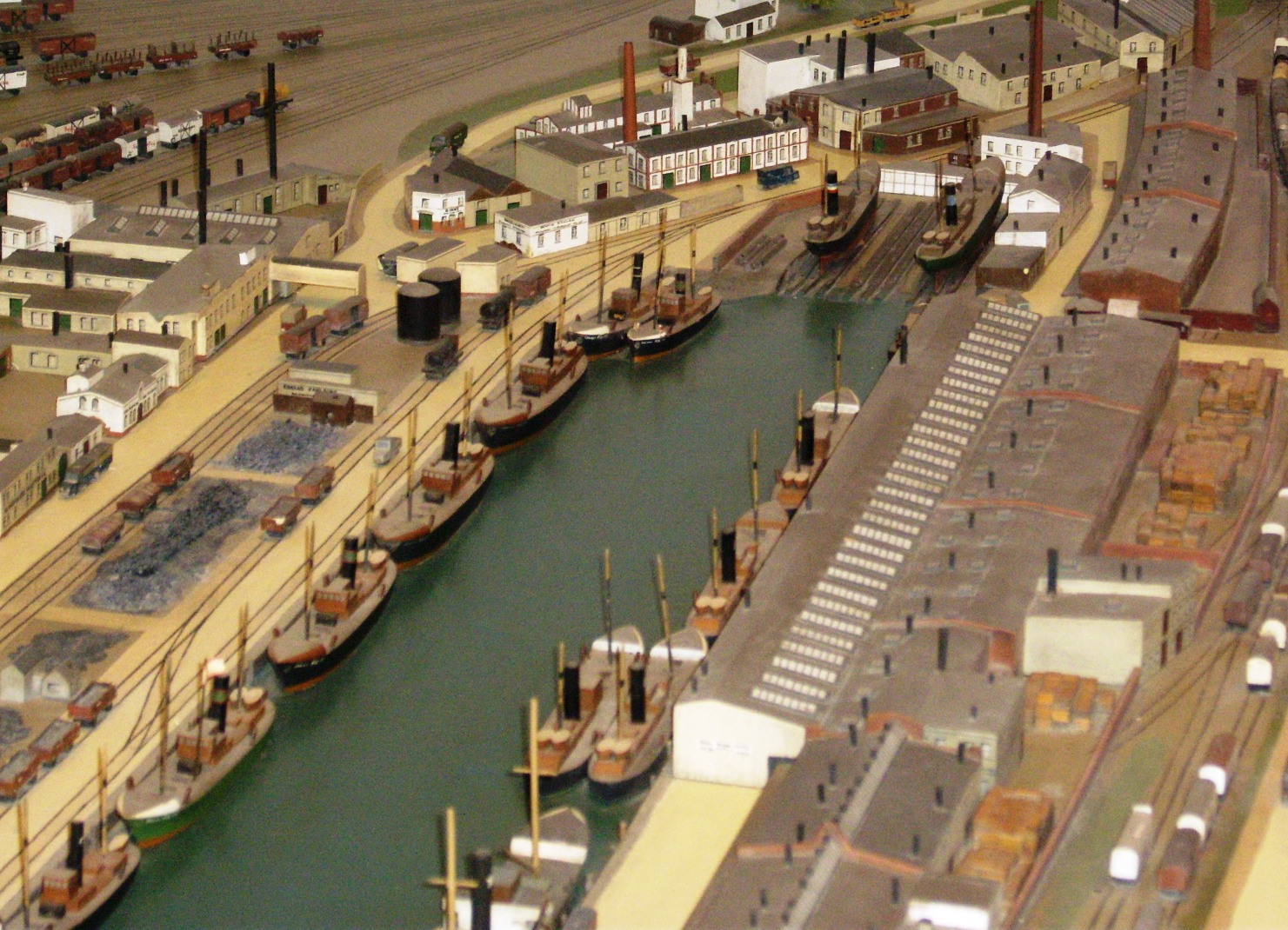 Blick auf das Modell der Reparaturwerft der Schiffbau-Gesellschaft Unterweser